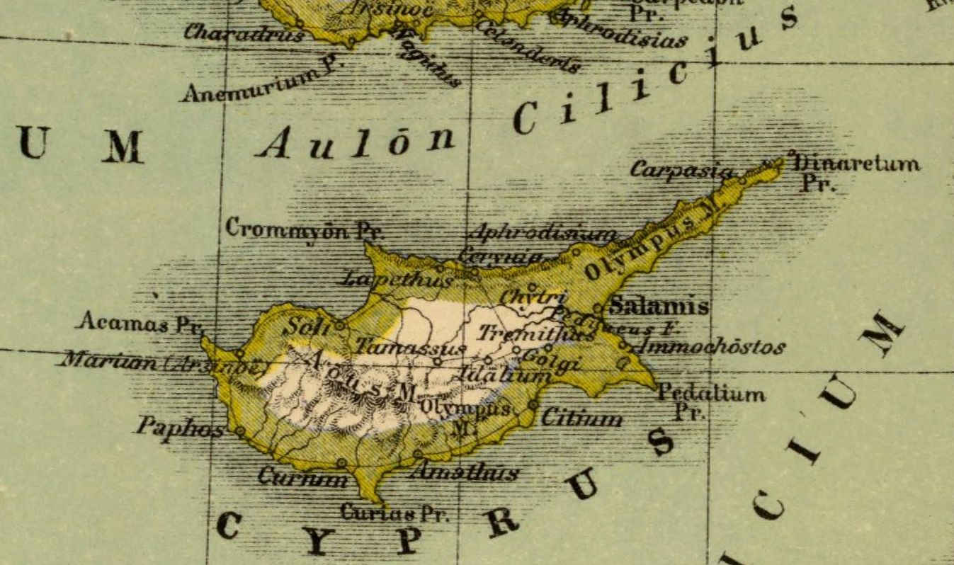 Cyprus. Asia citerior. Auctore Henrico Kiepert Berolinensi. Geographische Verlagshandlung Dietrich Reimer (Ernst Vohsen) Berlin, Wilhemlstr. 29. (1903)